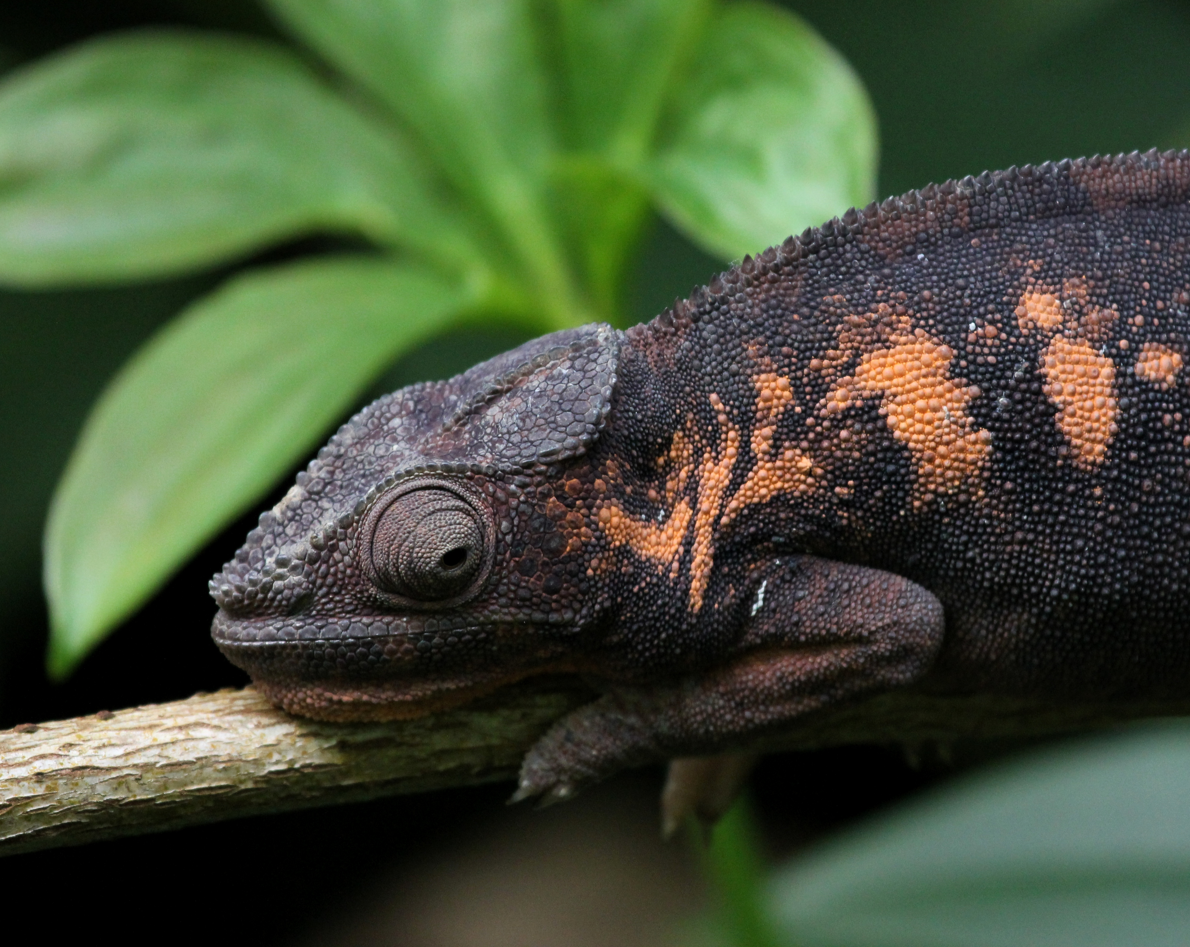 Kopf eines Pantherchamäleons (Furcifer pardalis)